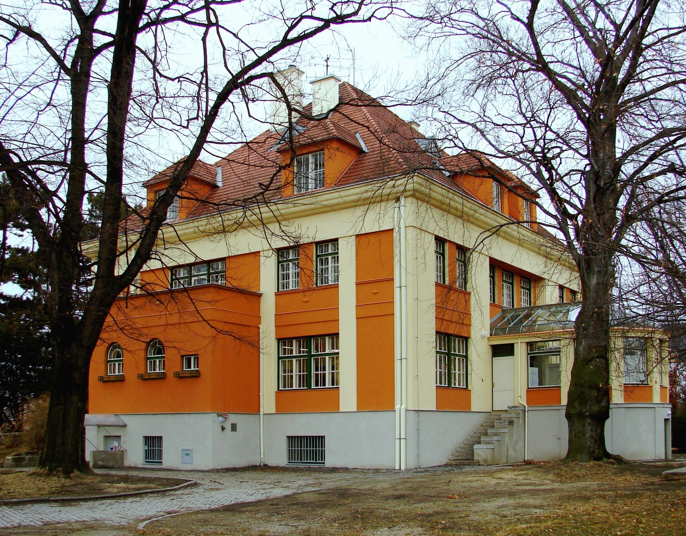 Vila (Krnov), Hlubčická 152/20